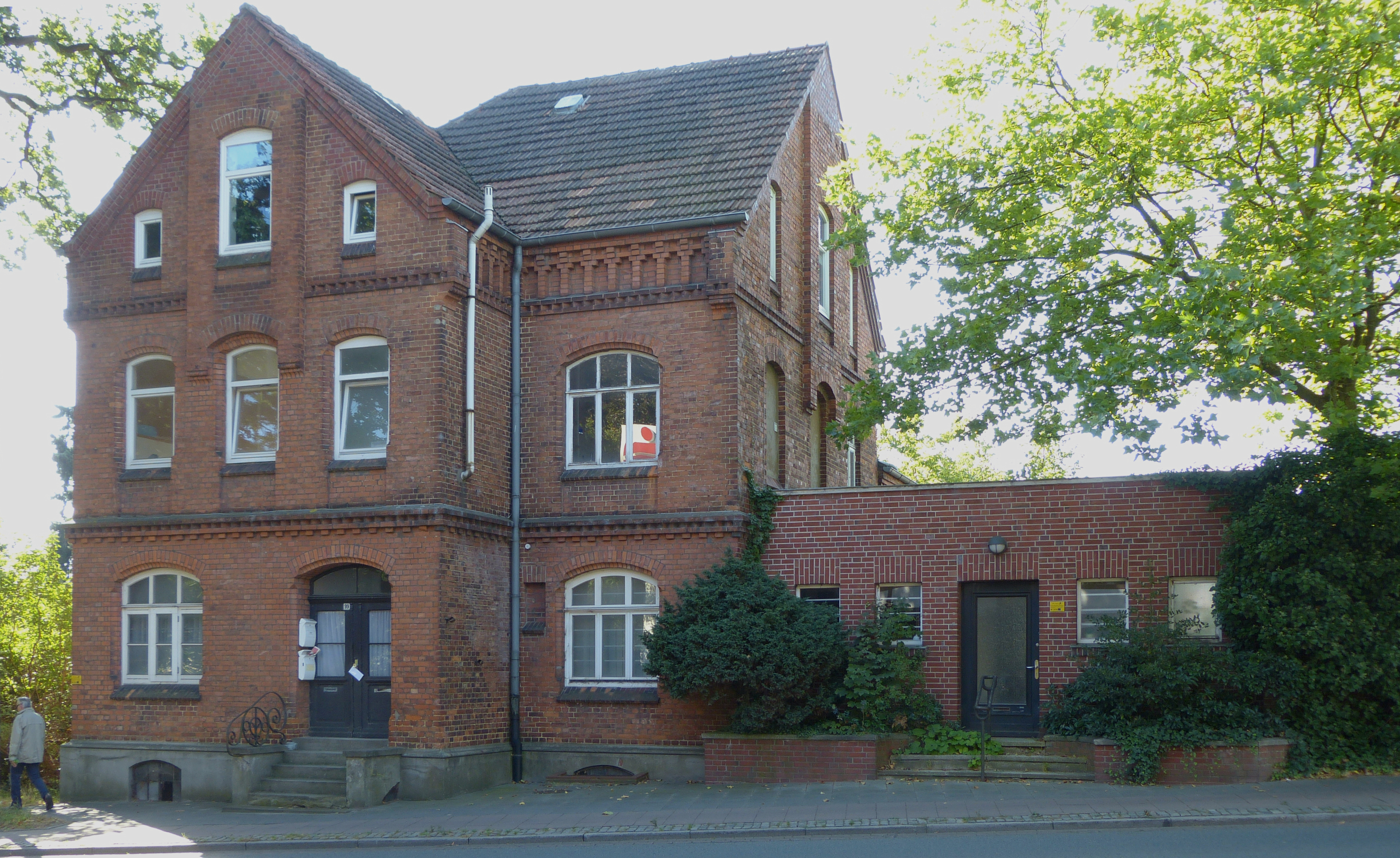 Bremer Wollkämmerei, Haus 1 und 2, Toranlage und Pförtnerhaus in Bremen, Landrat-Christians-Straße 99Das abgebildete Objekt ist ein geschütztes Kulturdenkmal in der Freien Hansestadt Bremen, mit der Nr. 2020 beim Landesamt für Denkmalpflege registriert.